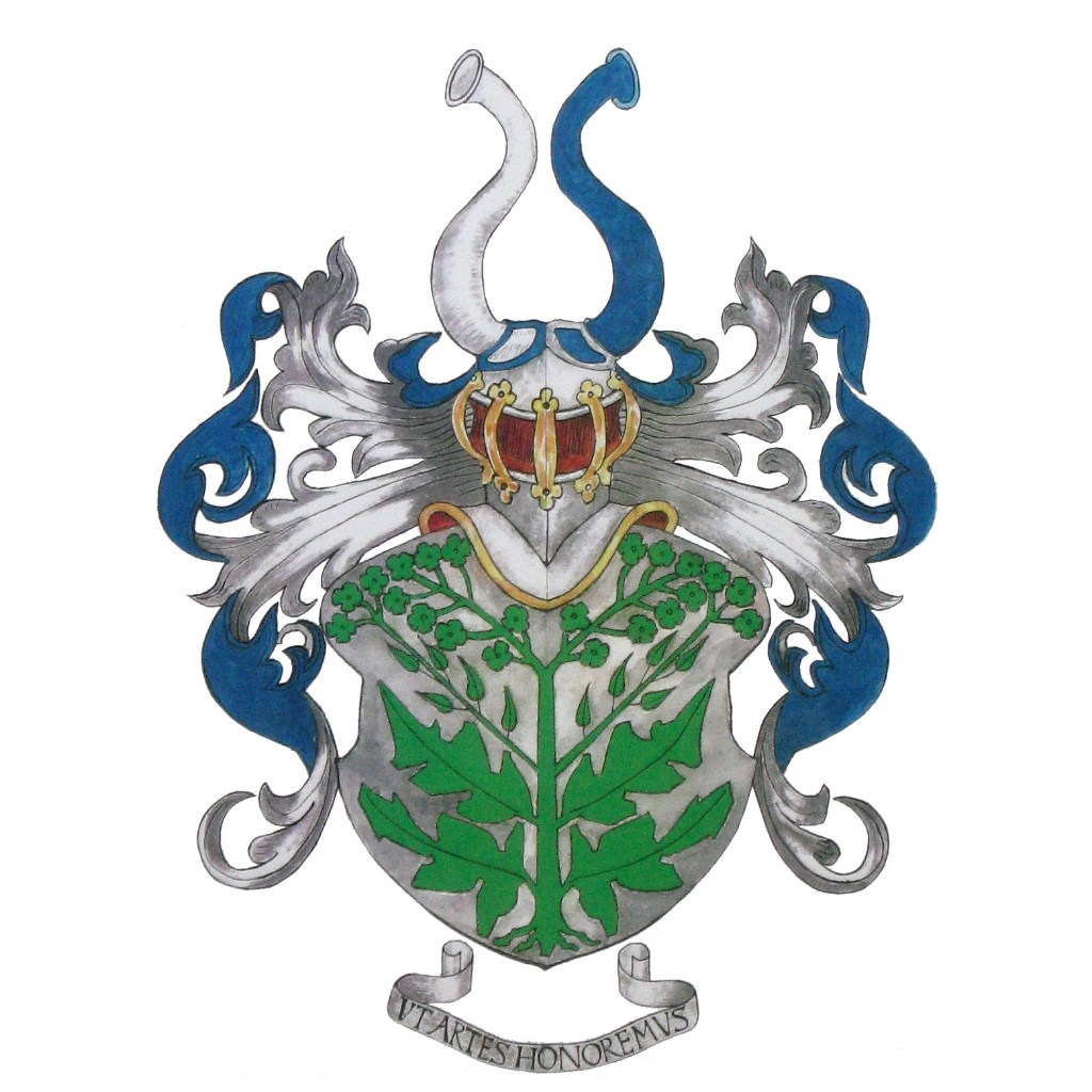 Adelswappen der Familie Sinapius (fränkisch-sächsische Linie)